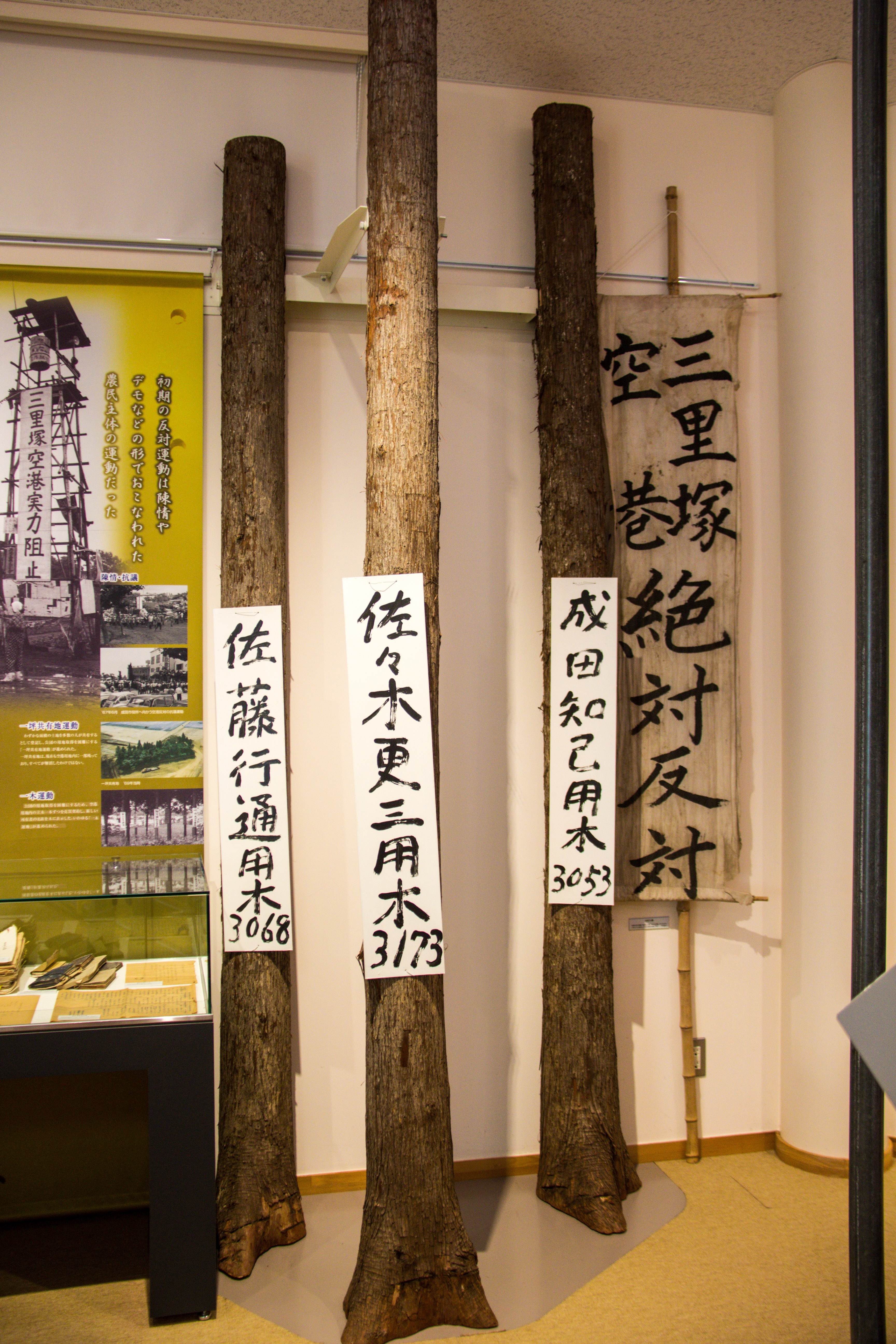 成田空港 空と大地の歴史館にて。立ち木トラストの看板。